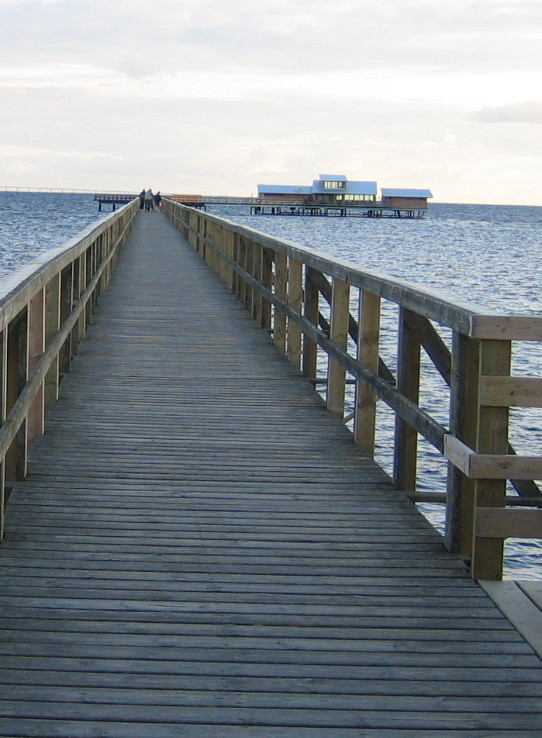 Långa Bryggan (the long jetty) in Bjärred, Sweden.